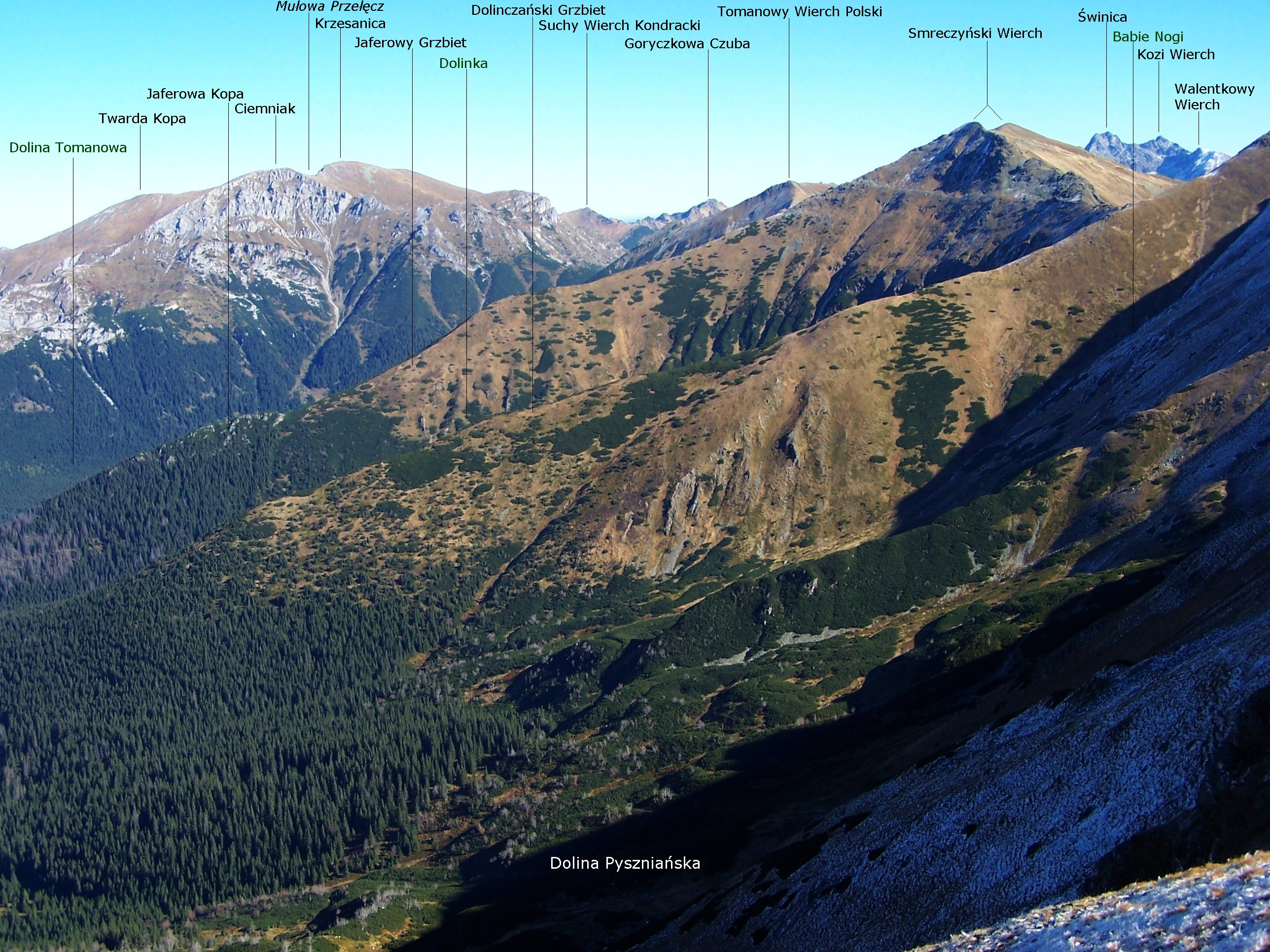 Widok z Ornaku na Dolinę Tomanową i jej otoczenie